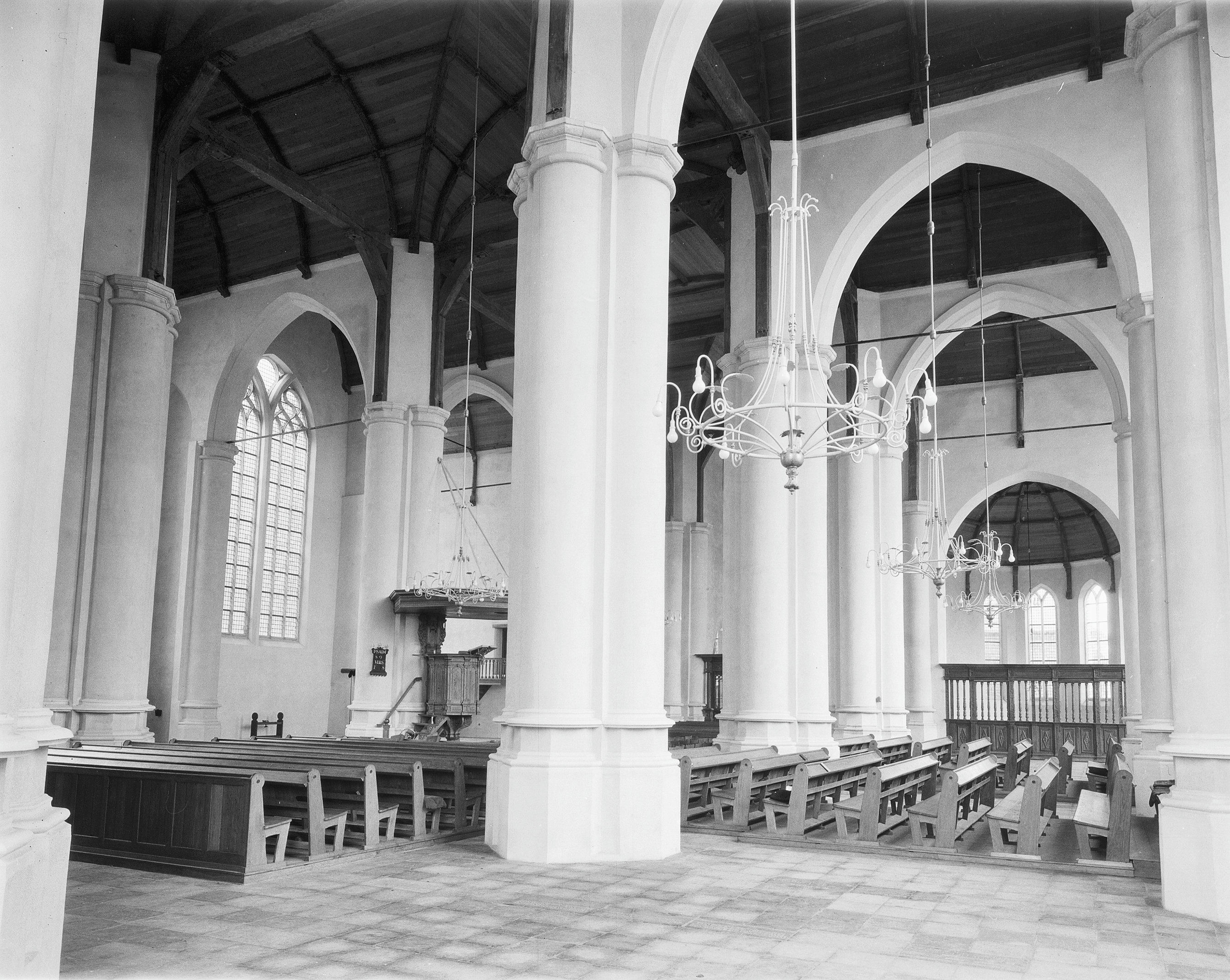 Nederlands Hervormde Kerk: interieur naar het noord-oosten